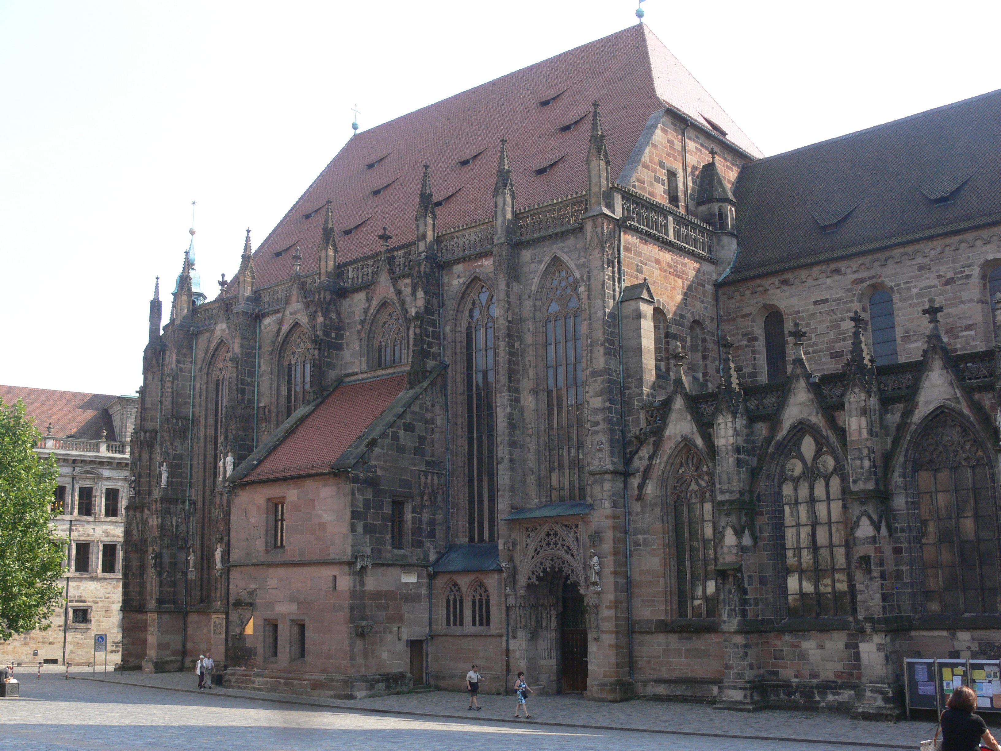 Eglise Saint-Sébald de Nuremberg